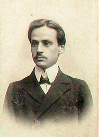 Носаль Михайло Андрійович - молоді роки